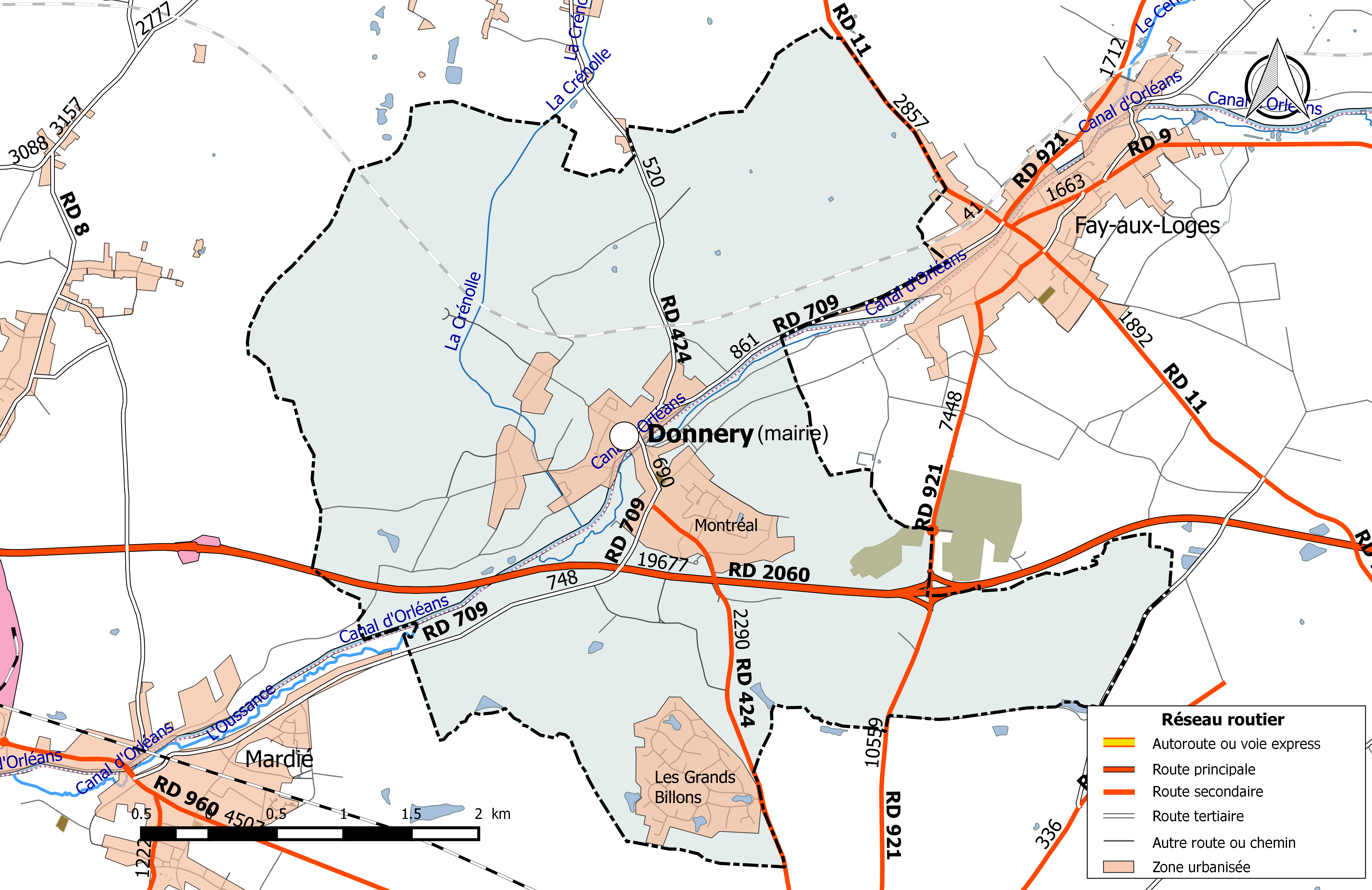 Carte du réseau routier de la commune de Donnery.